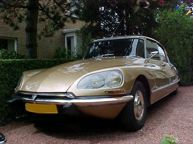 Citroen DS 21 Pallas 1969